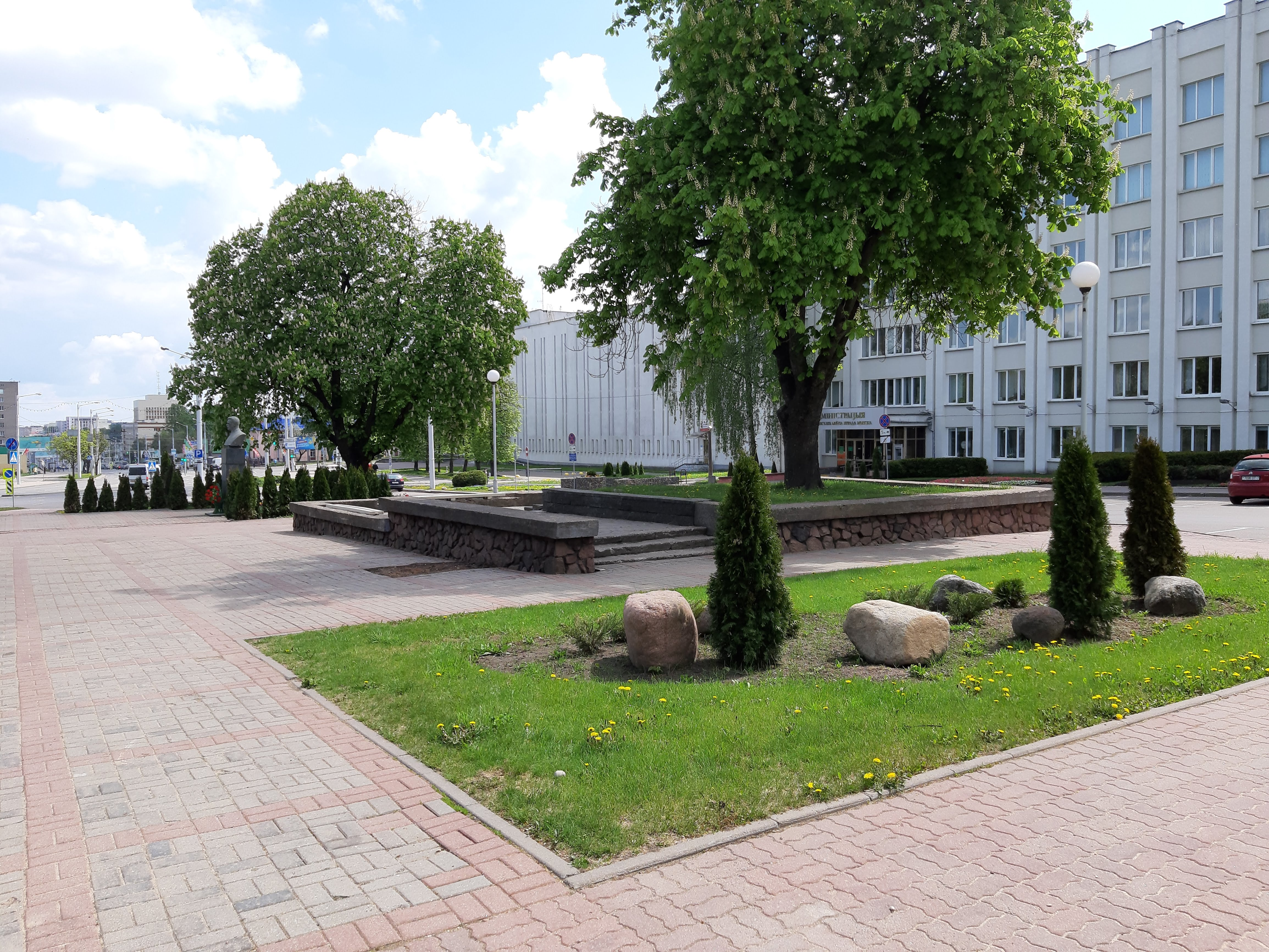 Мінск. Кальварыйскі сквер у 2019